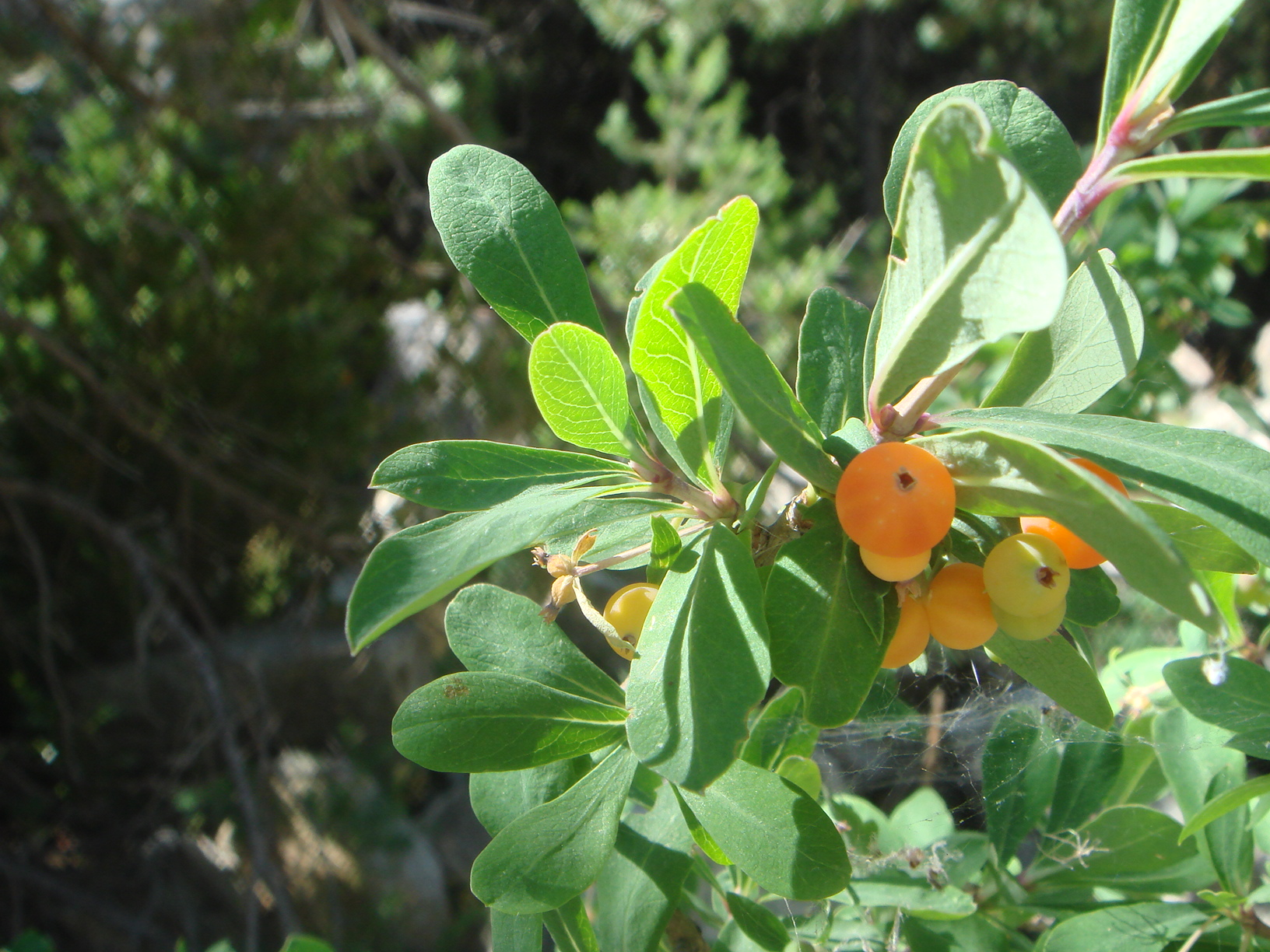 Madreselva pirenaica (Lonicera pyrenaica), Valle de Barrosa, Pirineos, (Huesca), España.